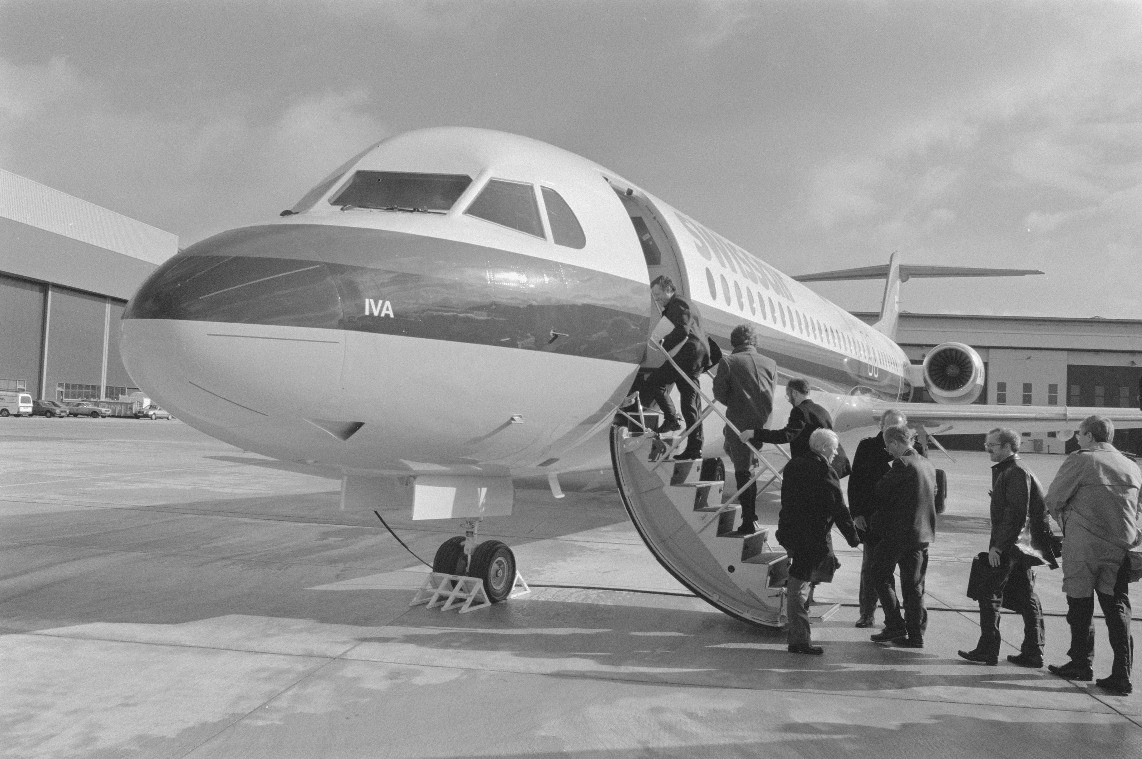 Collectie / Archief : Fotocollectie Anefo Reportage / Serie : [ onbekend ] Beschrijving : Overdracht 1e Fokker-100 aan Swissair; eerste Fokker-100 voor vertrek op Schiphol Datum : 29 februari 1988 Locatie : Noord-Holland, Schiphol Trefwoorden : Overdrachten, VERTREKKEN, vliegtuigen Persoonsnaam : Fokker 100 Fotograaf : Croes, Rob C. / Anefo Auteursrechthebbende : Nationaal Archief Materiaalsoort : Negatief (zwart/wit) Nummer archiefinventaris : bekijk toegang 2.24.01.05 Bestanddeelnummer : 934-1993